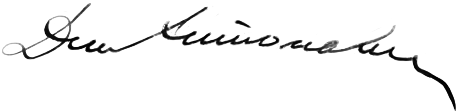 Роспись украинского учёного и политика Дмитрия Антоновича (1877–1945)